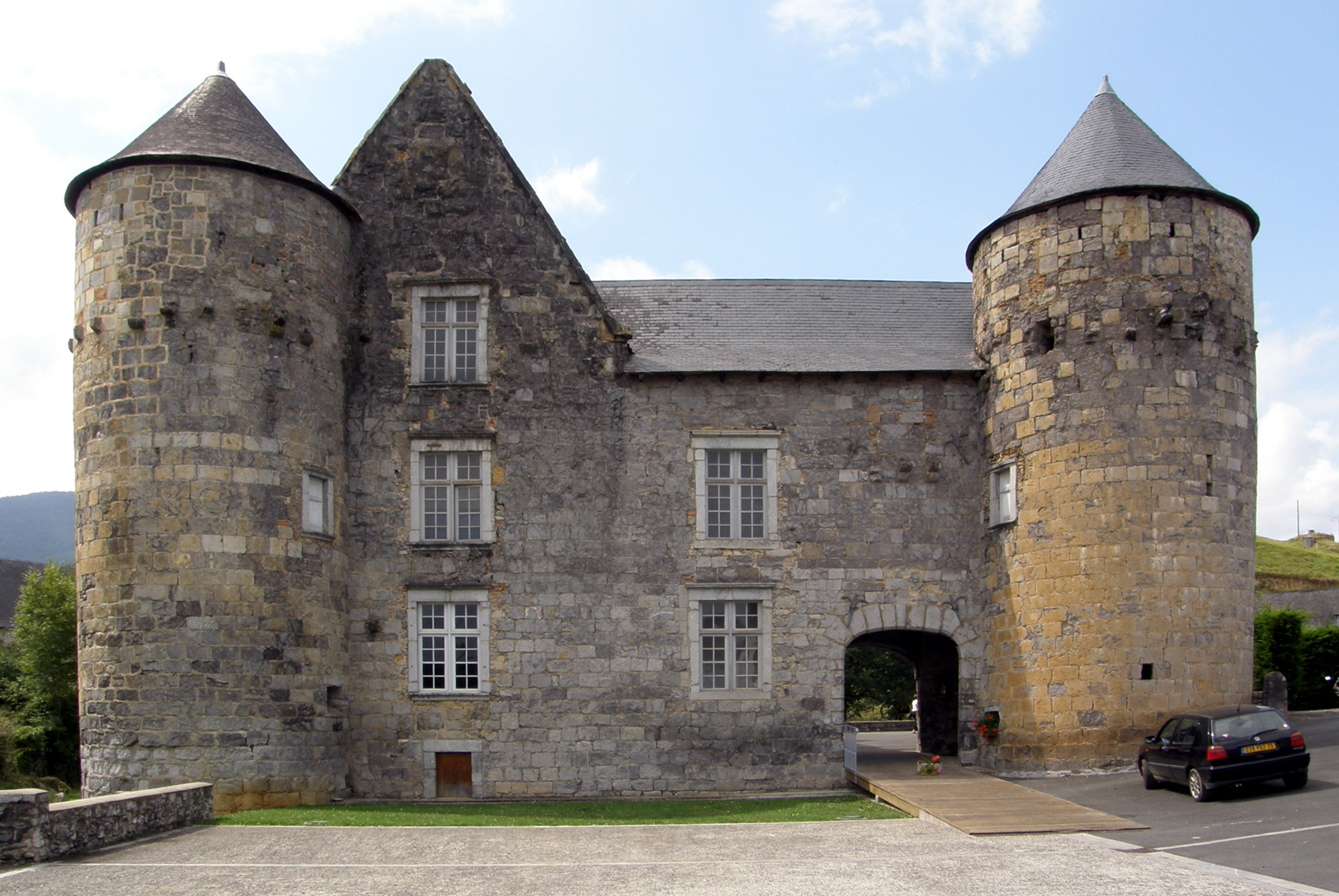 Chateau Ruthie , Aussurucq , Pyrénées-Atlantiques (France)